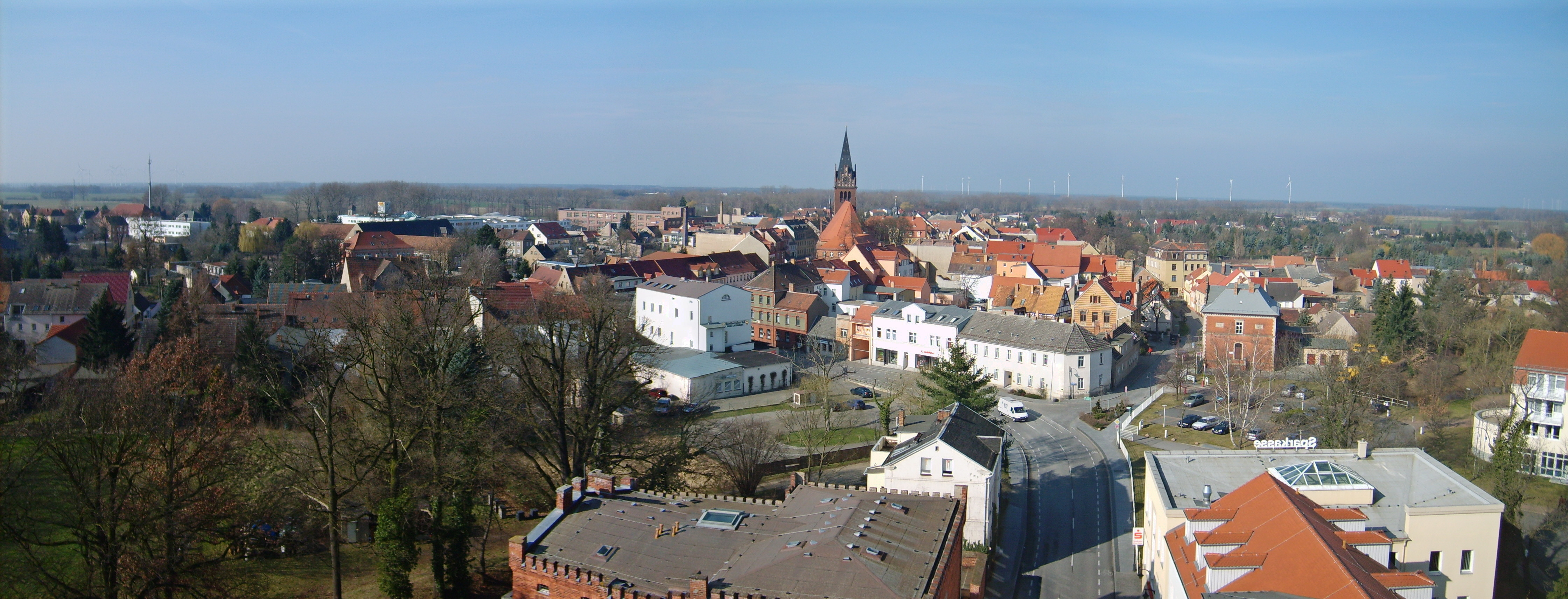 Panorama-Ansicht von Bad Liebenwerda vom Lubwartturm (Westseite)